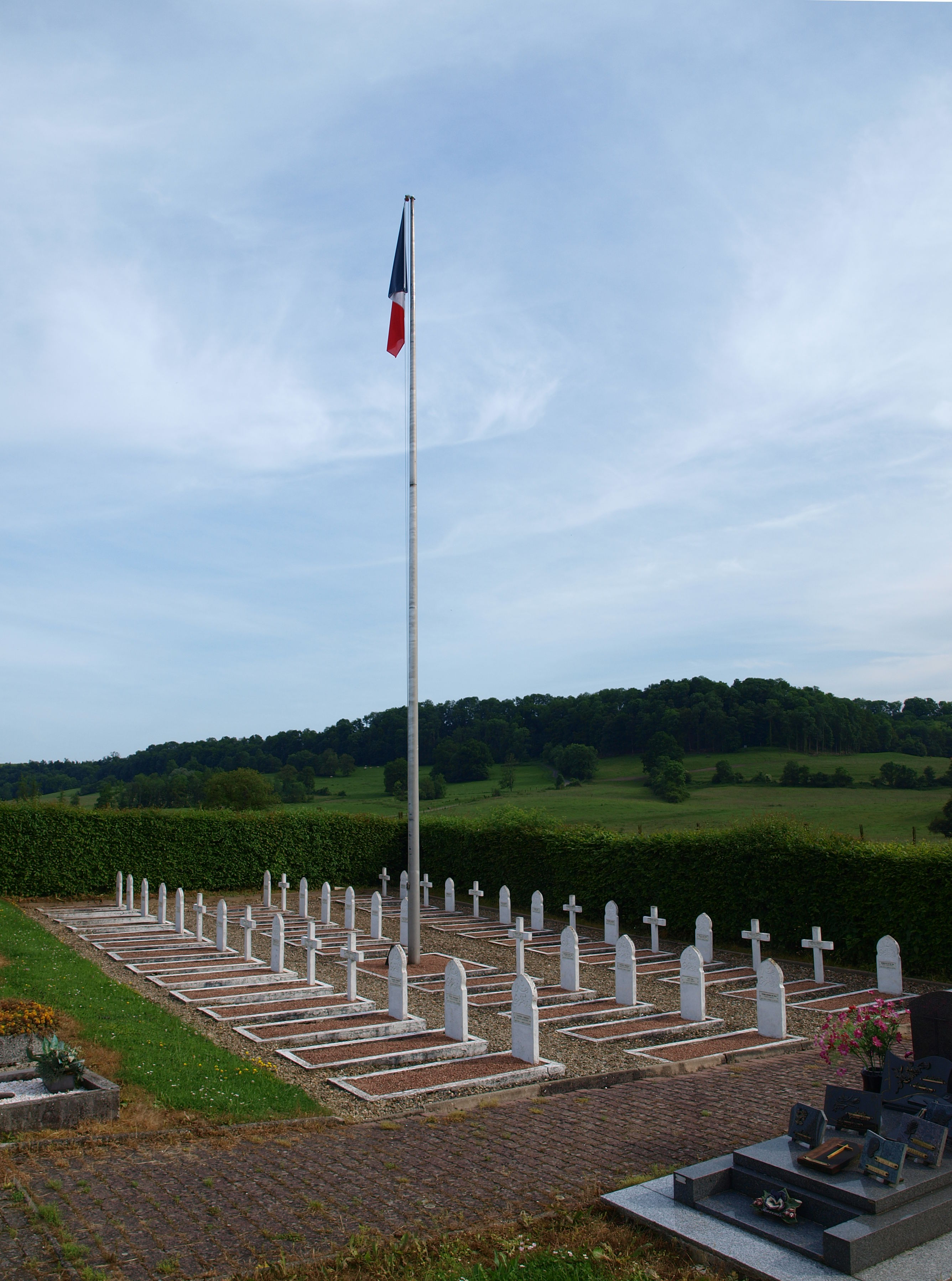 La Horgne (Ardennes, France) ; sépultures militaires des spahis, dans le cimetière communal.